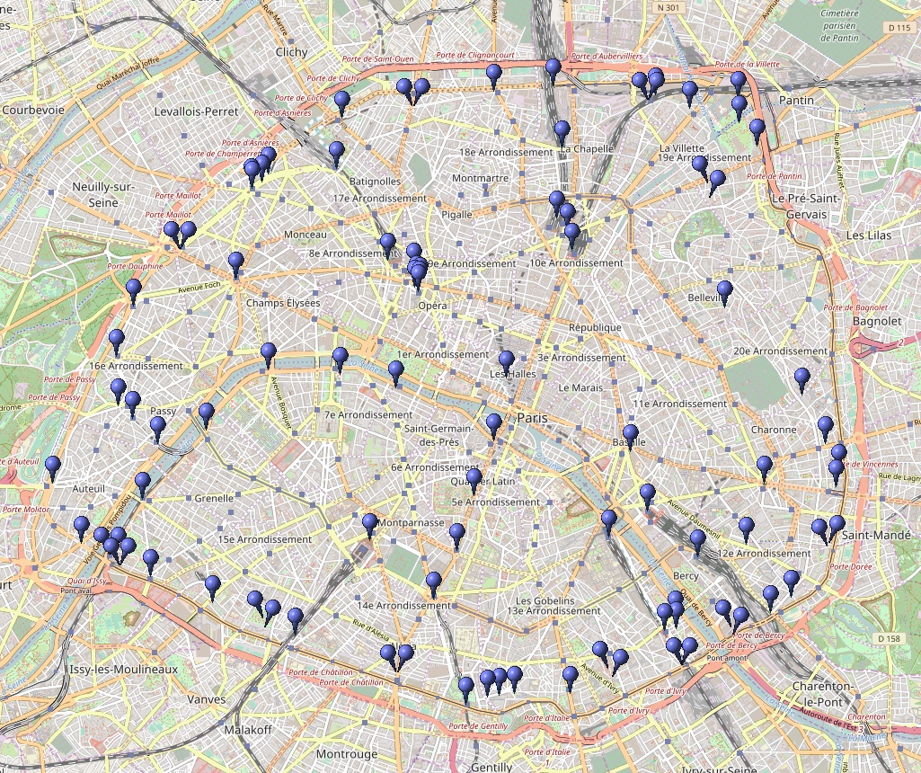 L'emplacement des gares ferroviaires à Paris en décembre 2016